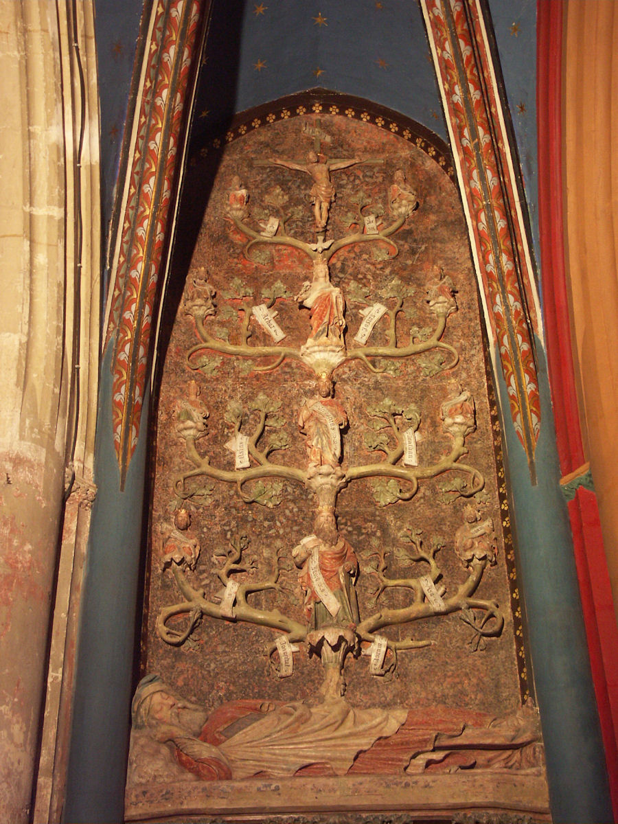 Basilique Saint-Quentin, France